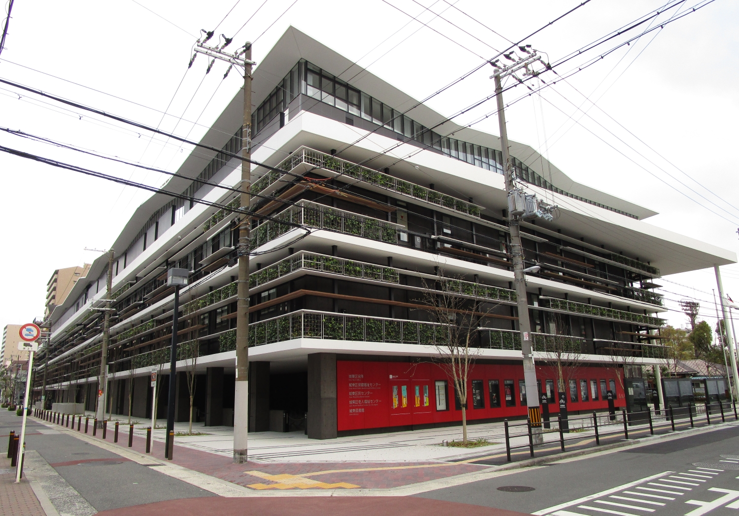 城東区複合施設